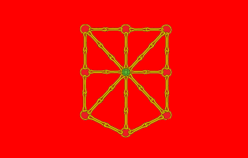 Nafarroako bandera ez-ofiziala, kororik gabea. Bandera no-oficial de Navarra, sin corona.